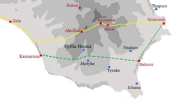 Sicilia_sud_orientale_citta'_V_sec_ac